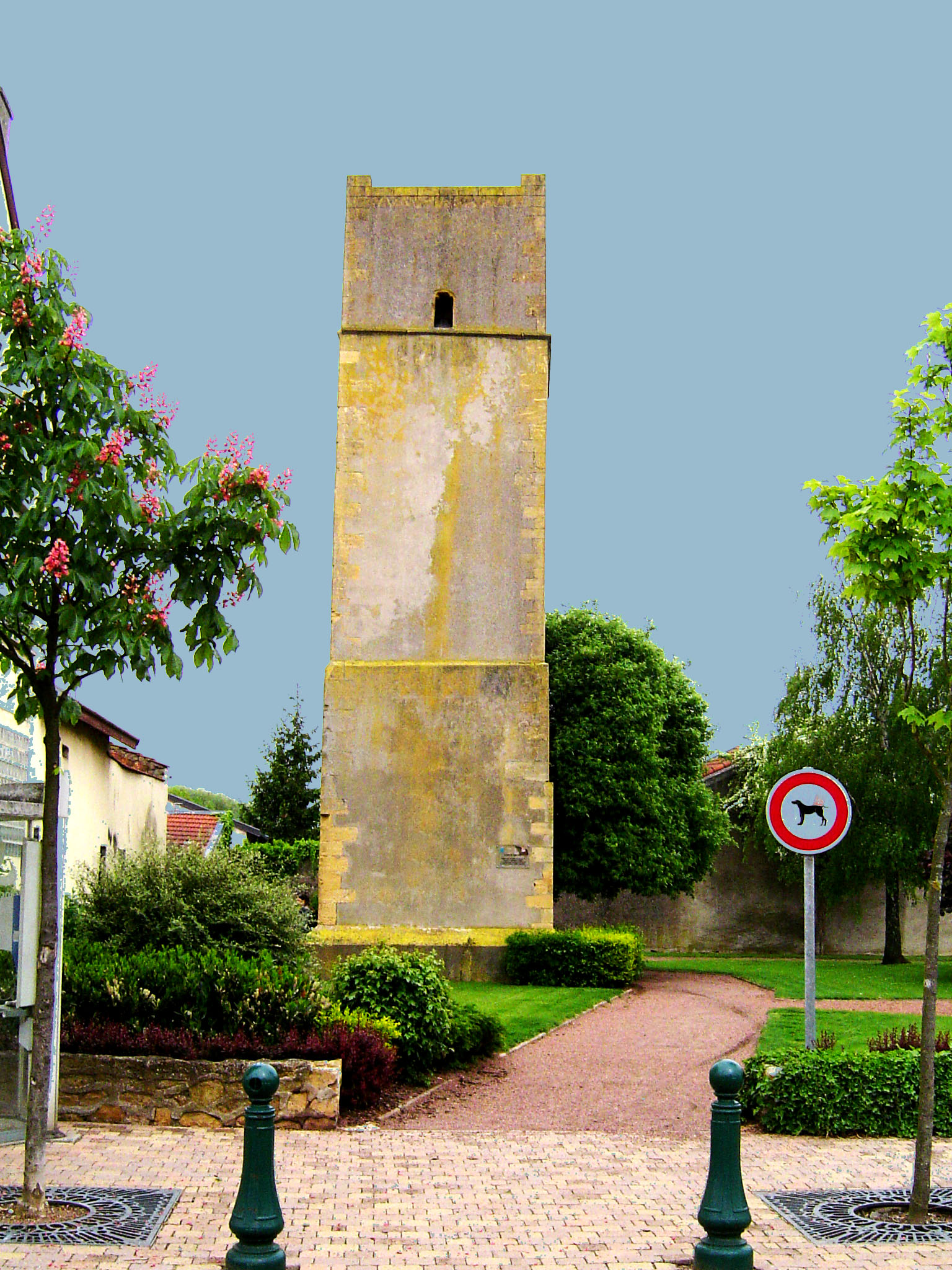 Tour de Guet - 12ème siècle